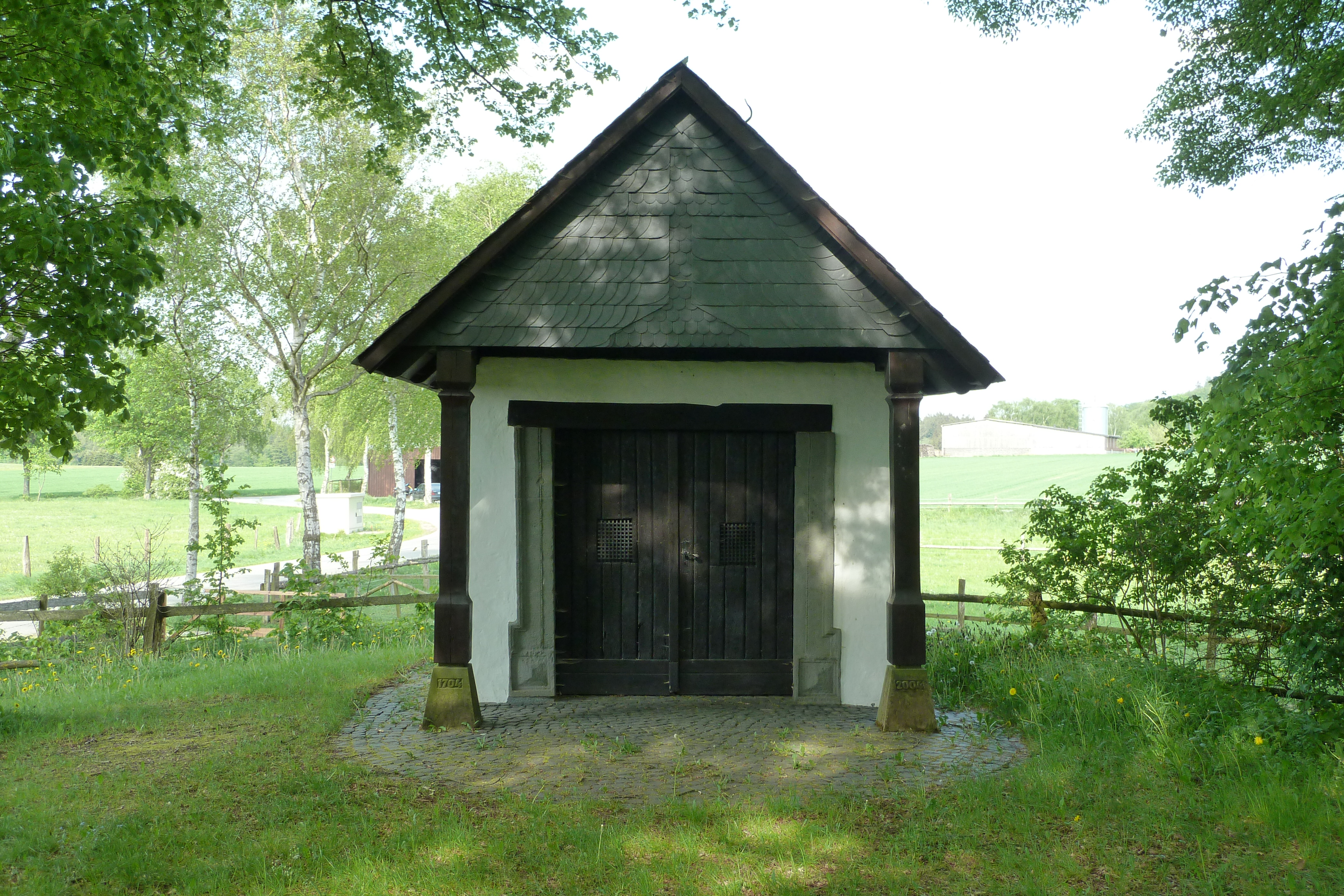 Odacker Kapelle in Warstein-Hirschberg. Denkmalschutz seit 27. November 1984.